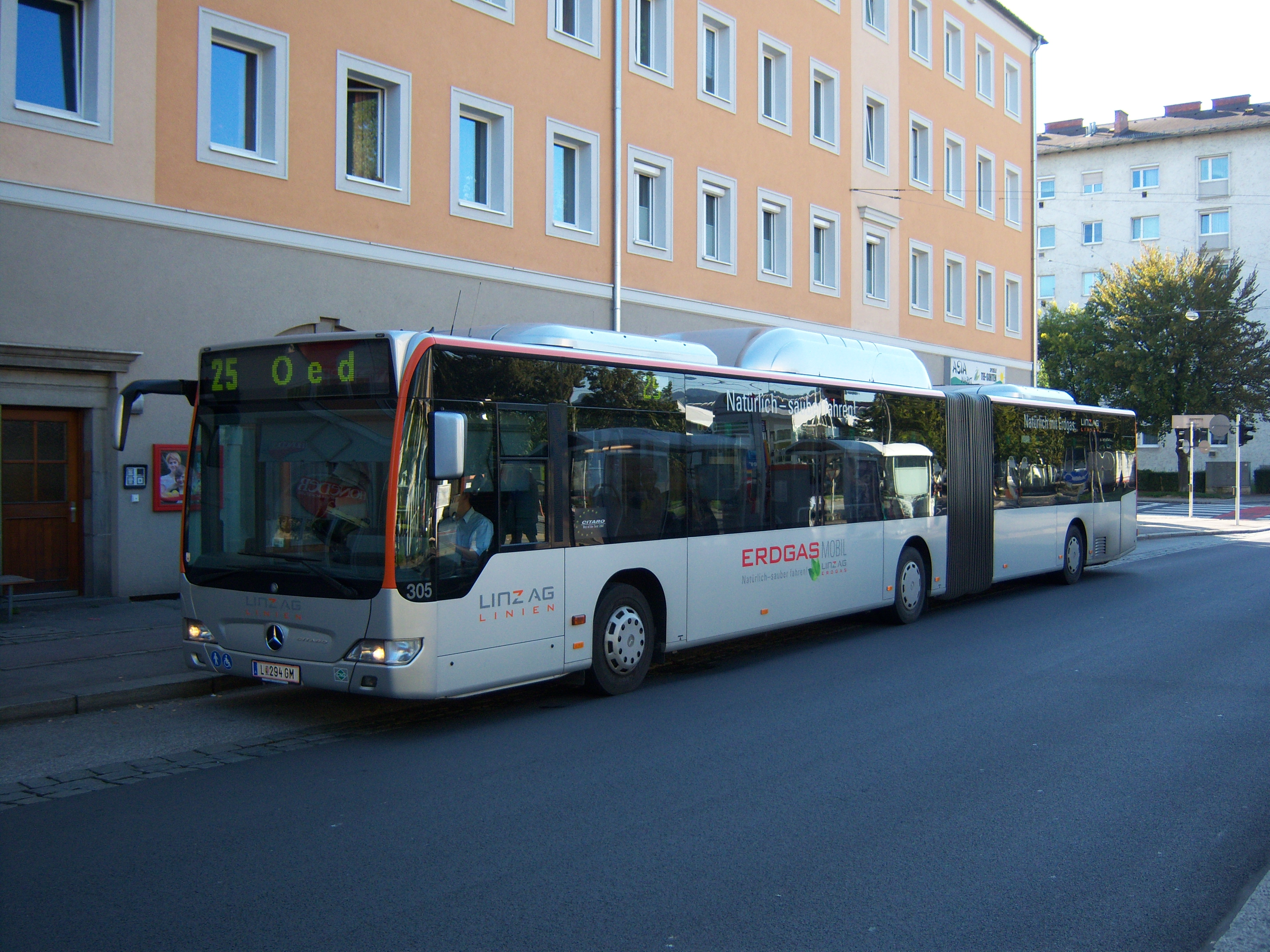 Autobushaltestelle Linke Brückenstraße in Linz